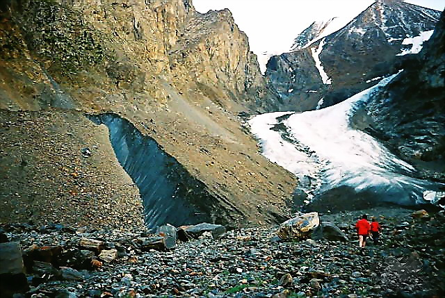 К концу языка активно отступающего ледника Малый Актру на Алтае. Слева от ледника, под плащом моренно-осыпных отложений - мощная толща мёртвого льда.